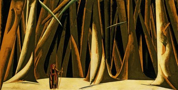 ВЛАДИМИР ТАТЛИН Лес. Эскиз декорации. 1913. ГТГ